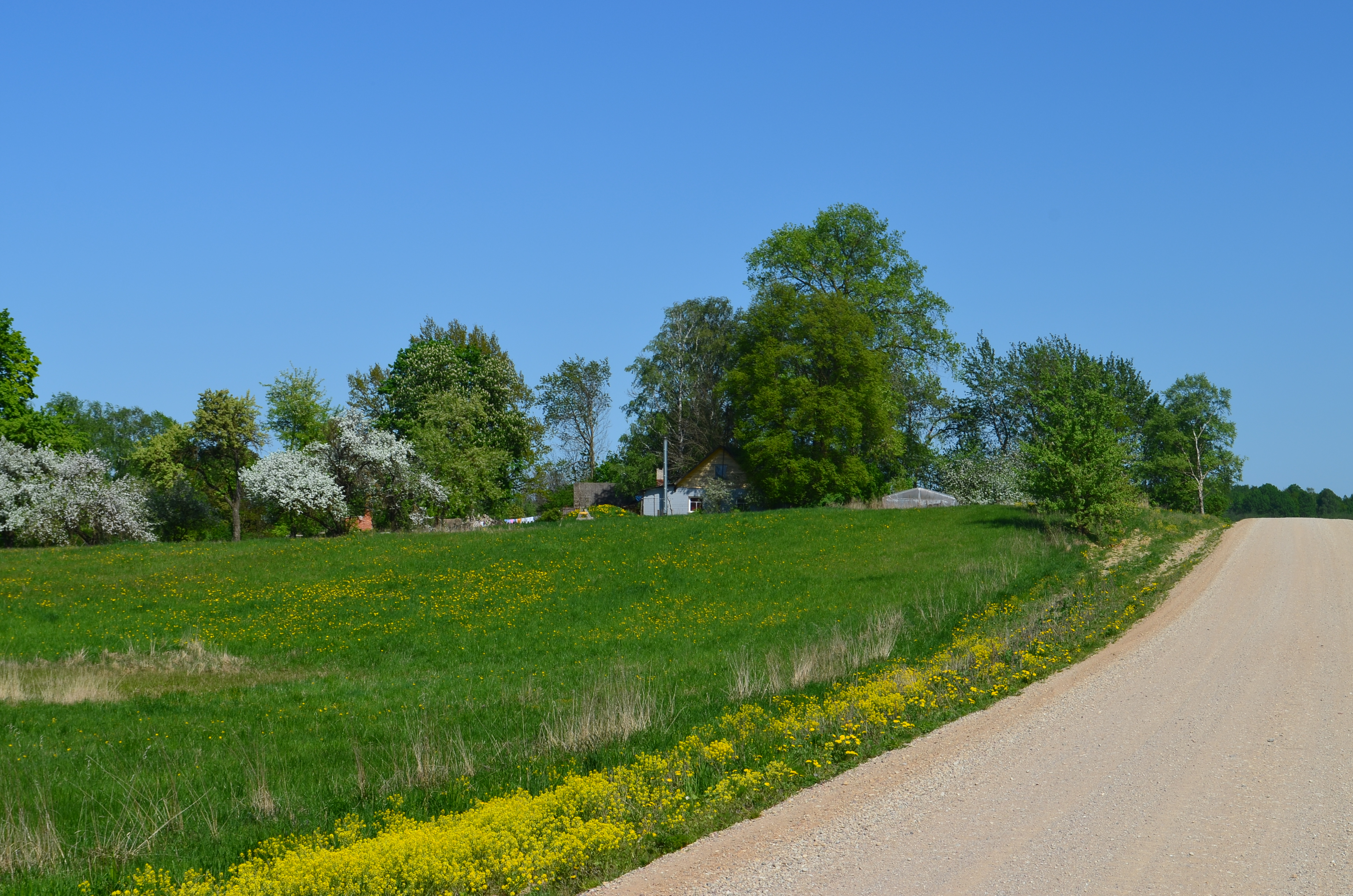 Kliepšiai, Žemaitkiemio sen., Ukmergės raj.